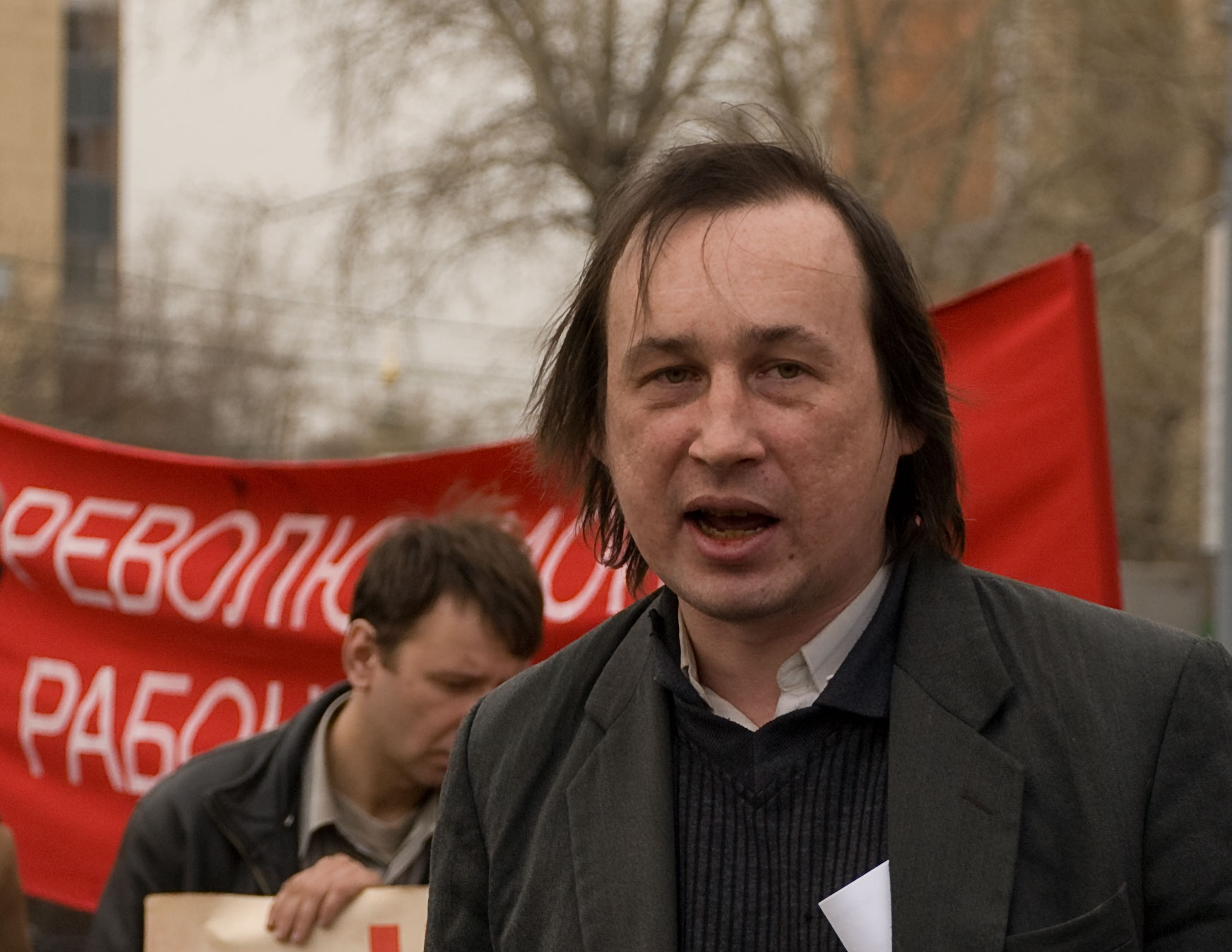 Сергей Биец выступает на митинге